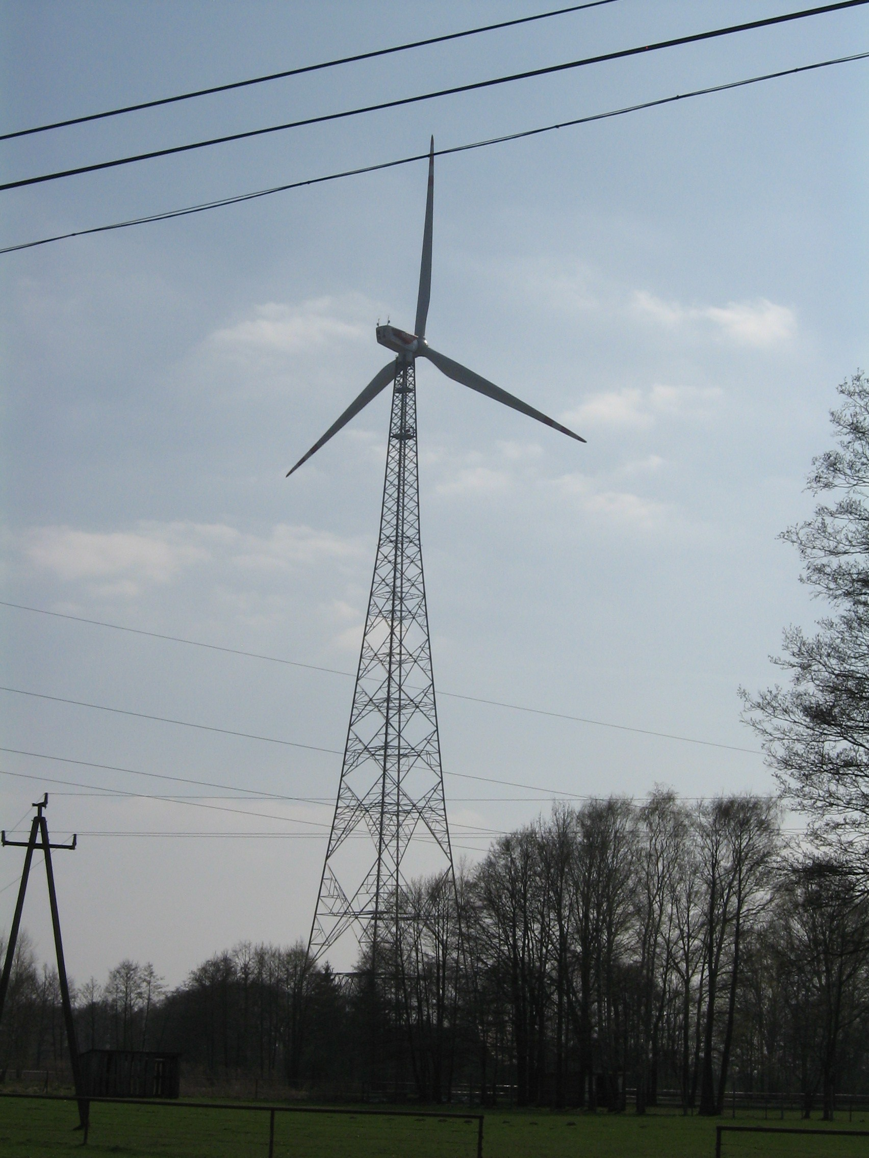 Windkraftanlage in Nowy Tomyśl (Polen)